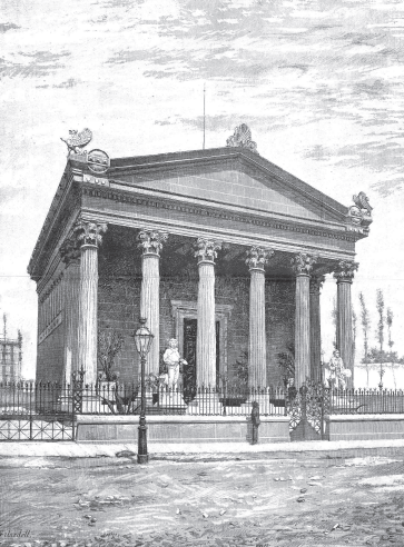 Taller-estudi dels Masriera, al número 72 del carrer Bailèn, entre Diputació i Consell de Cent. S'aixeca encara avui l'edifici en forma de templet clàssic amb sis columnes corínties, coronat per un frontó triangular als extrems del qual hi ha dos grius, animals mitològics meitat àguiles i meitat lleons. Obra de l'arquitecte Josep Vilaseca i Casanovas, fou inaugurat el 28 d'abril de 1884 i va acollir el taller d'orfebreria dels germans Francesc i Josep Masriera i Manovens, que procedien d'una acabalada família de joiers. L'edifici estava inspirat en el temple romà d'August que hi havia al Mons Taber barceloní.